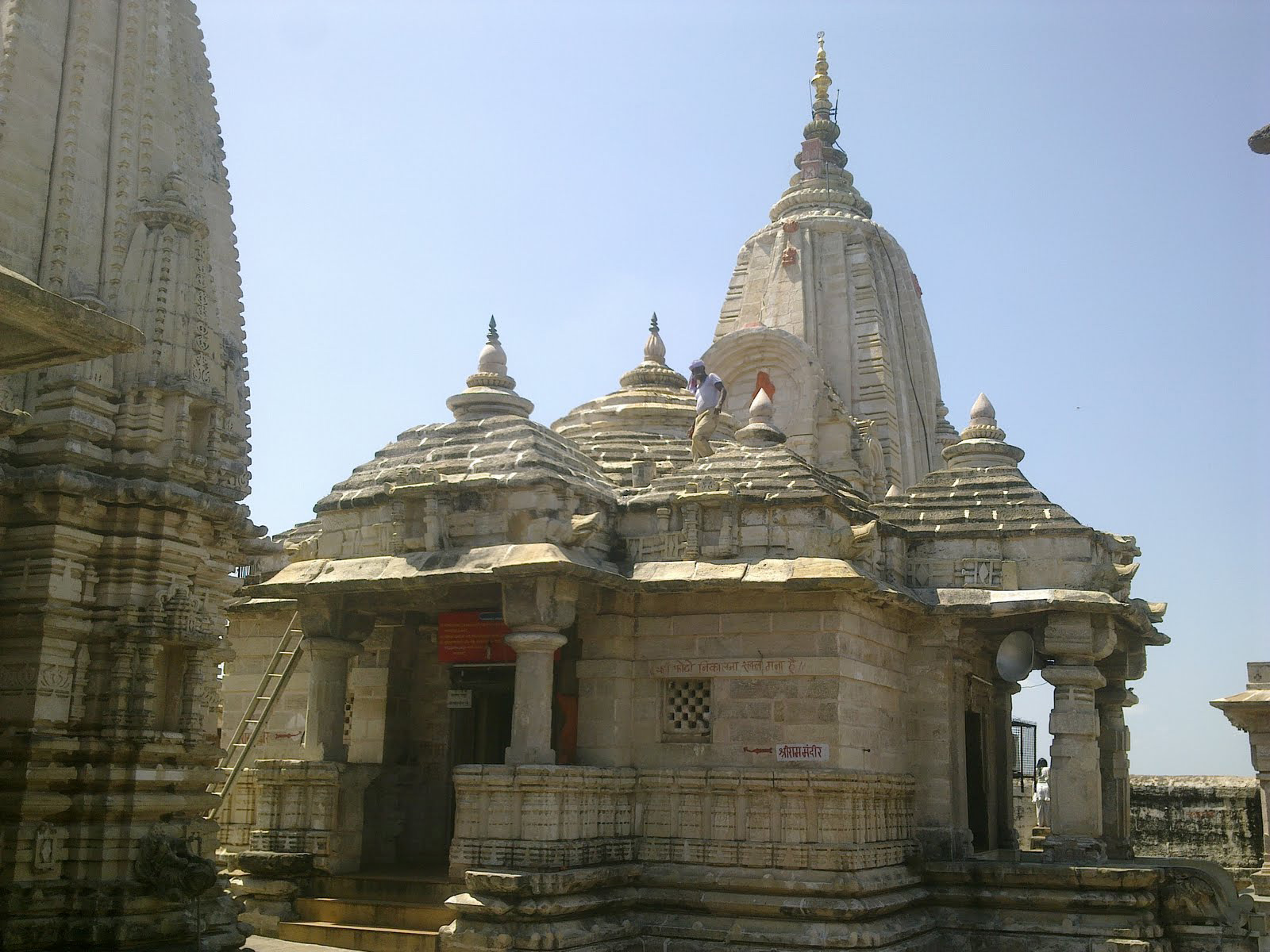 Ram Temple, Ramtek